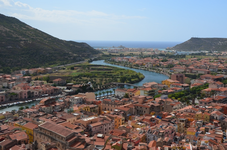 Serravalle. Kilátás a várból (Szardínia, Olaszország)